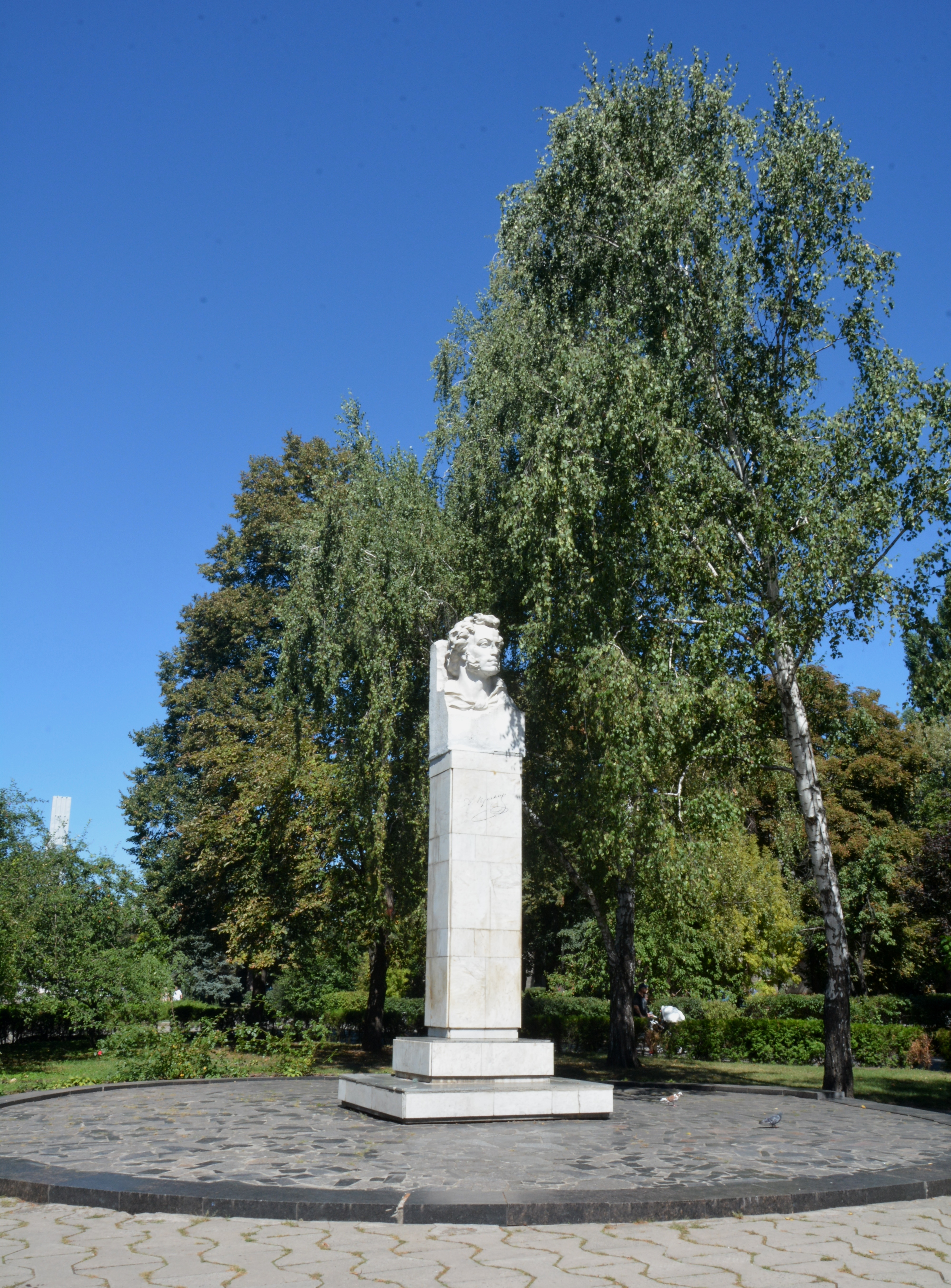 Пам’ятник російському поету і письменнику О.С.Пушкіну., Кременчук, Бульвар Пушкіна.